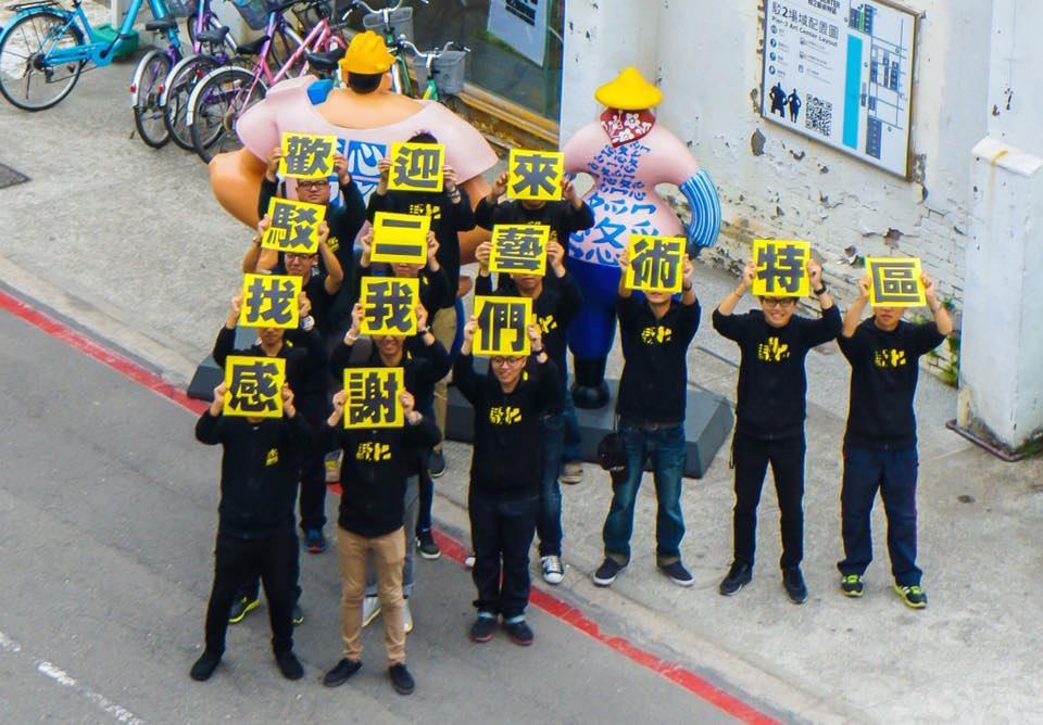 於駁二藝術特區服役的替代役役男隸屬於高雄市政府文化局。每年服役的人數約十至十五名。每三個月退伍一梯並招收一梯。